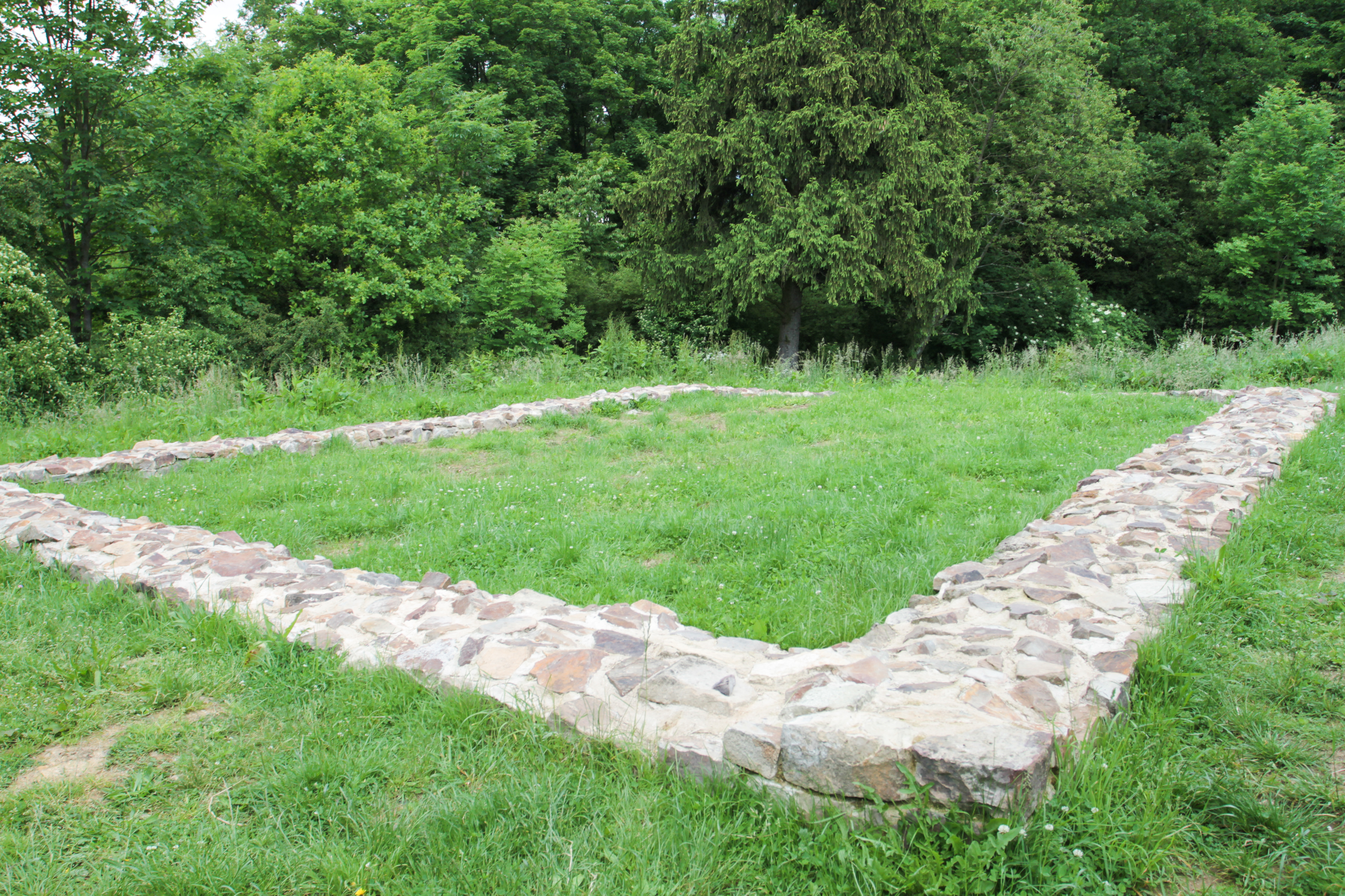 Hradiště Hůrka s rotundou svatého Petra, Starý Plzenec.